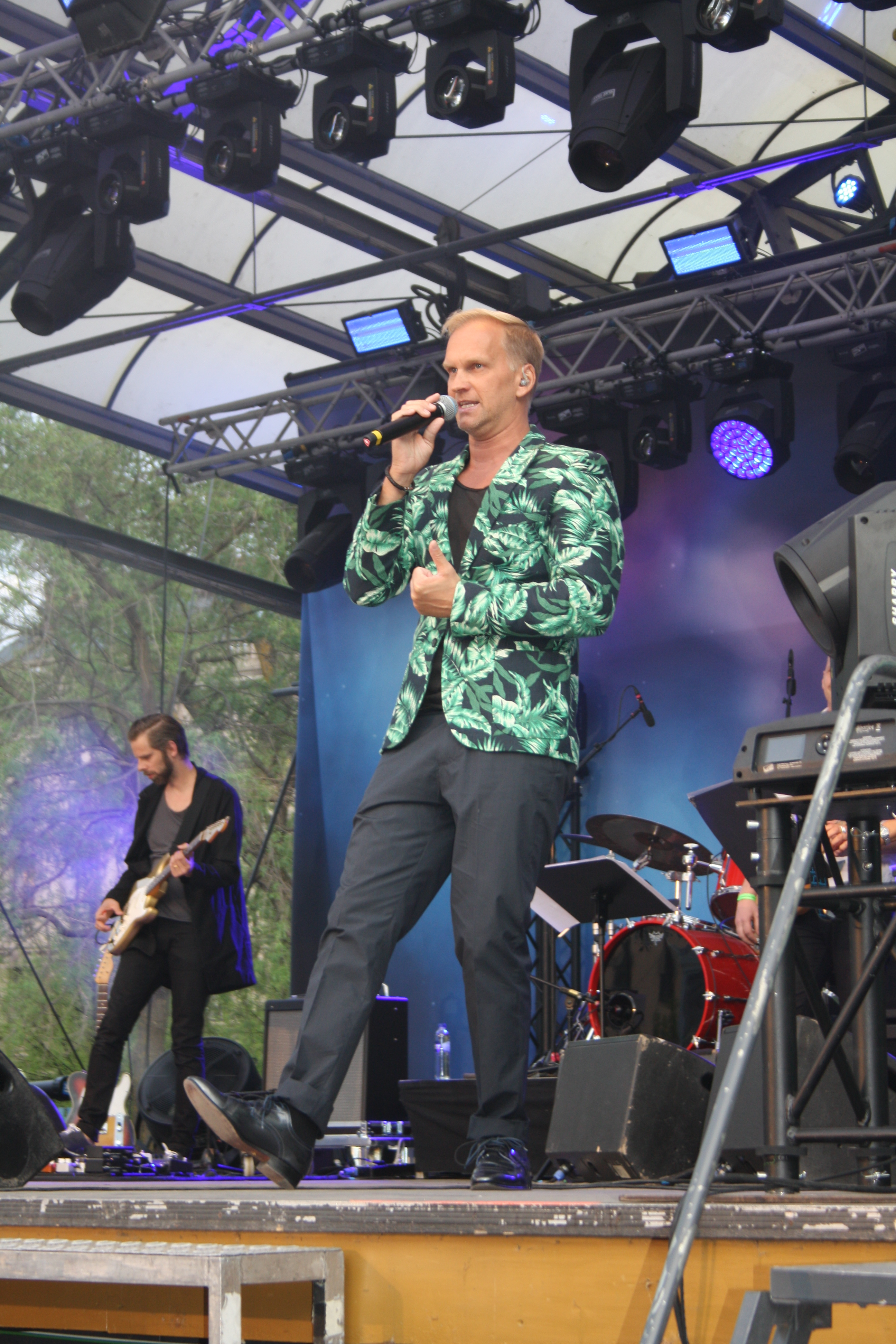 Gabriel Forss - Eurovision Village 2016 4